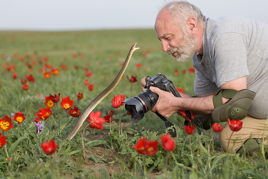 Маныч-Гудило (филиал заповедника Черные земли), Приютненский район This image is related to the protected area of Russia number 0800014